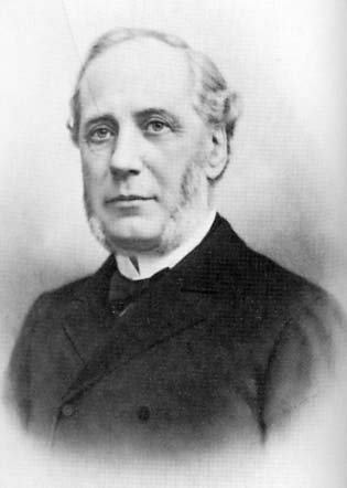 Ludvig Fredholm (1830–1891) Primär källa saknas men fotografiet är tillräckligt gammalt för att kunna märkas med Template:Anonymous work på Commons